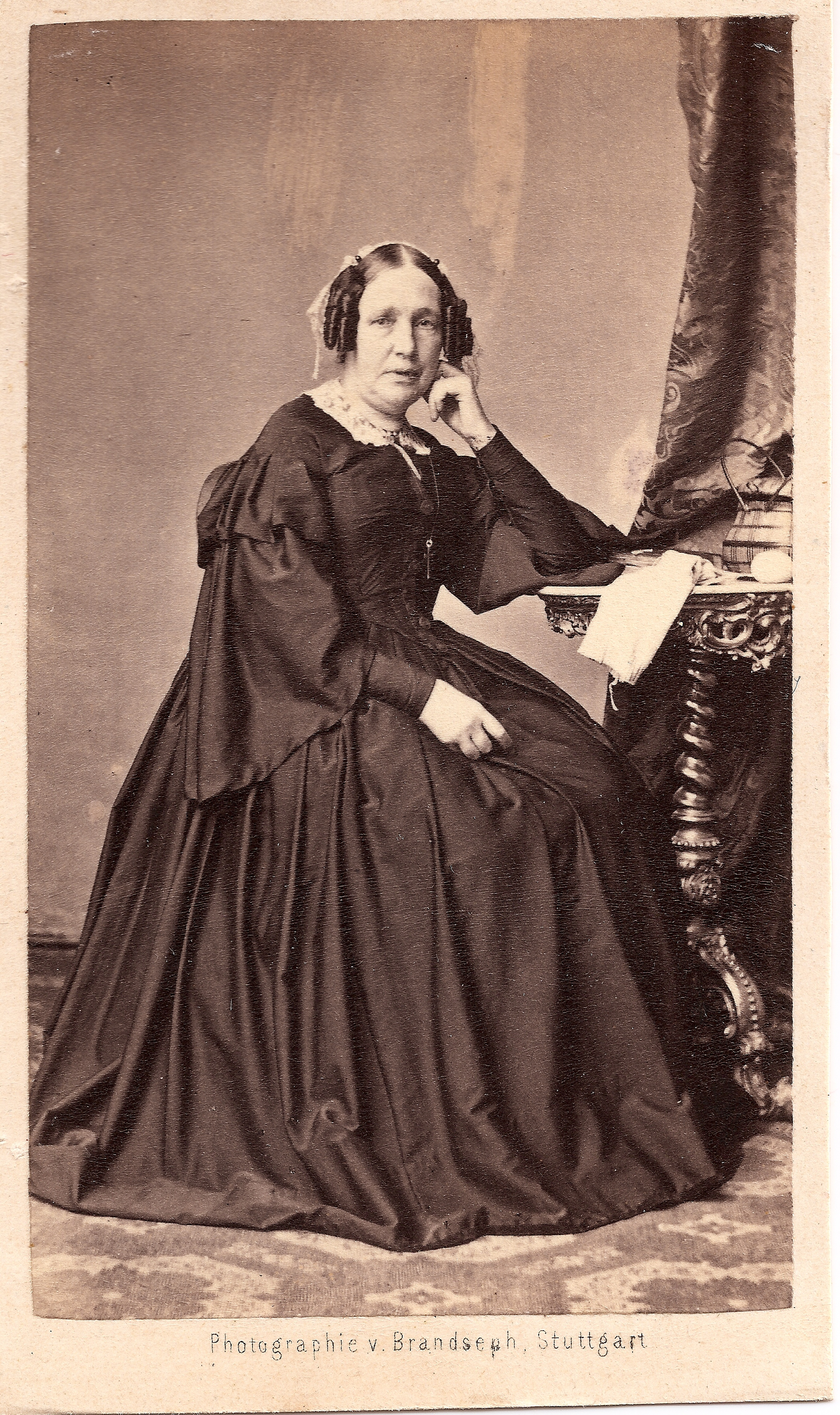 Luise Elben, geborene Conradi, Tochter des Leopold Conradi ∞ Luise Feuerlein, auf einer Carte de Visite, Fotografie von Friedrich Brandseph, Abzug auf Albuminpapier um 1862